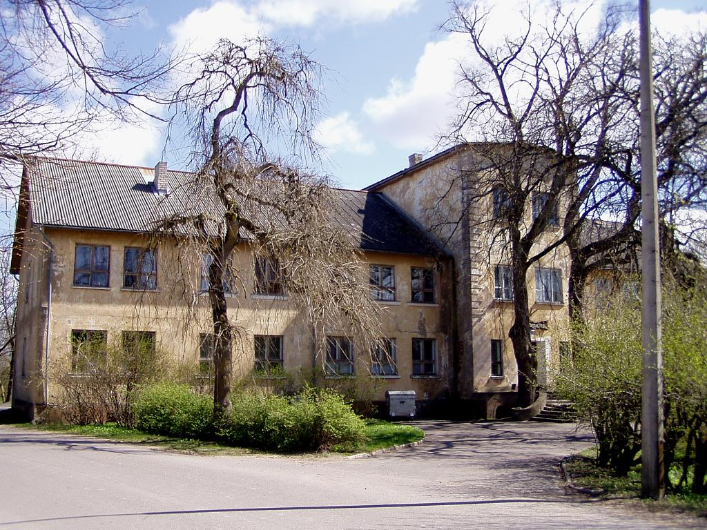 Tārgales muižas pils 2007-04-30